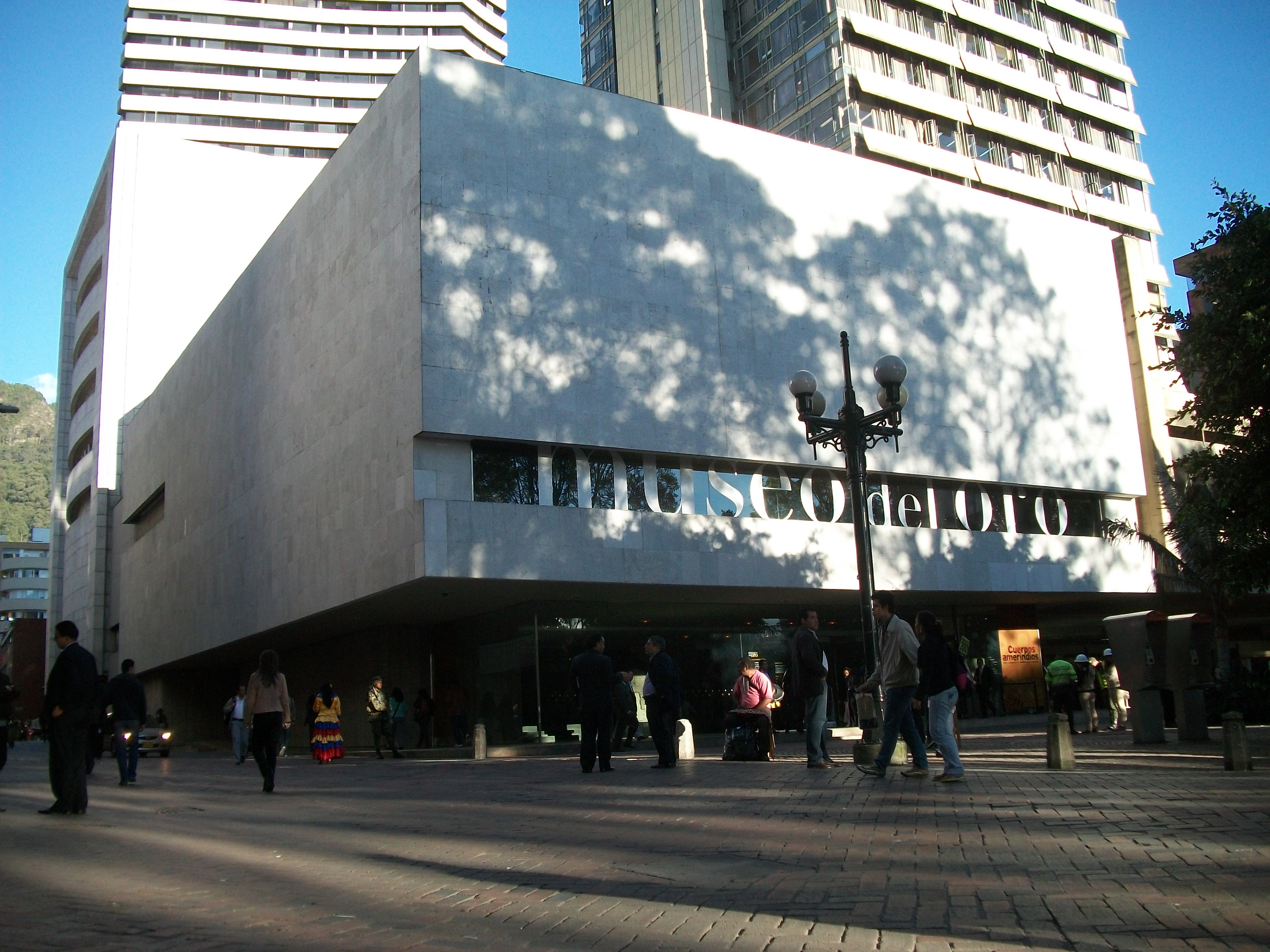 Entrada del Museo del Oro en la calle 16, en el parque Santander.